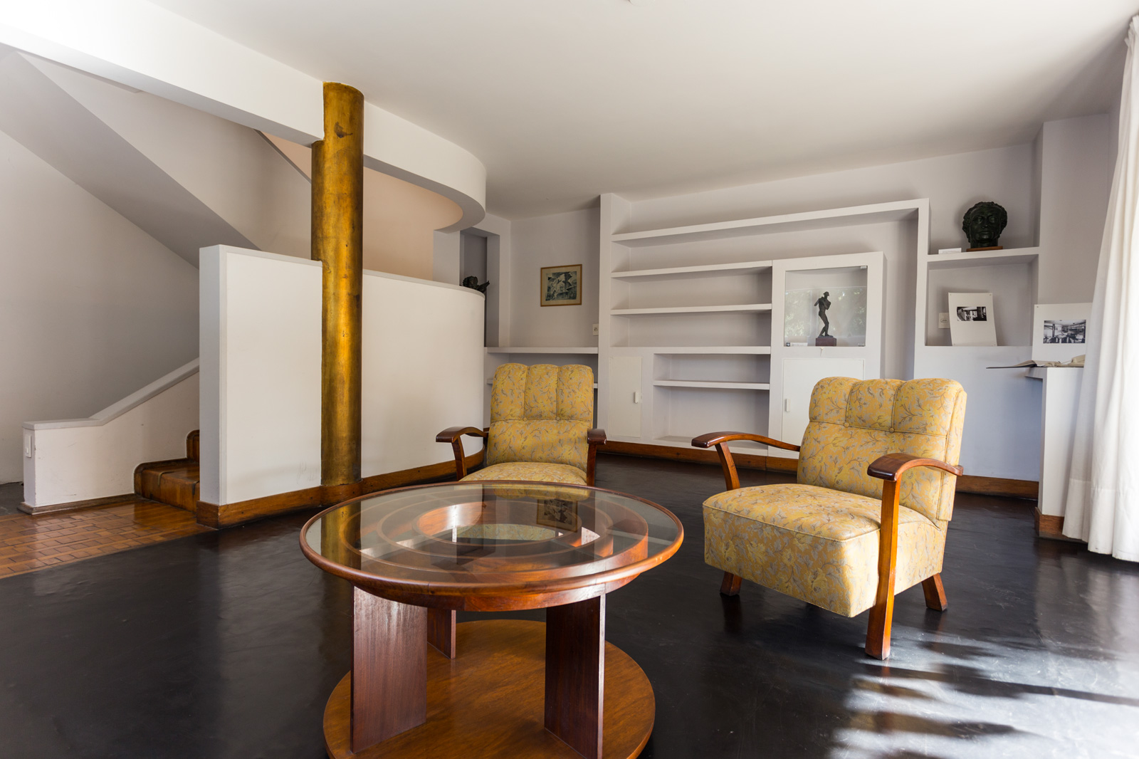 Casa del Arq. Julio Villamajó. Ubicada en el departamento de Montevideo